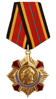 PMR state order